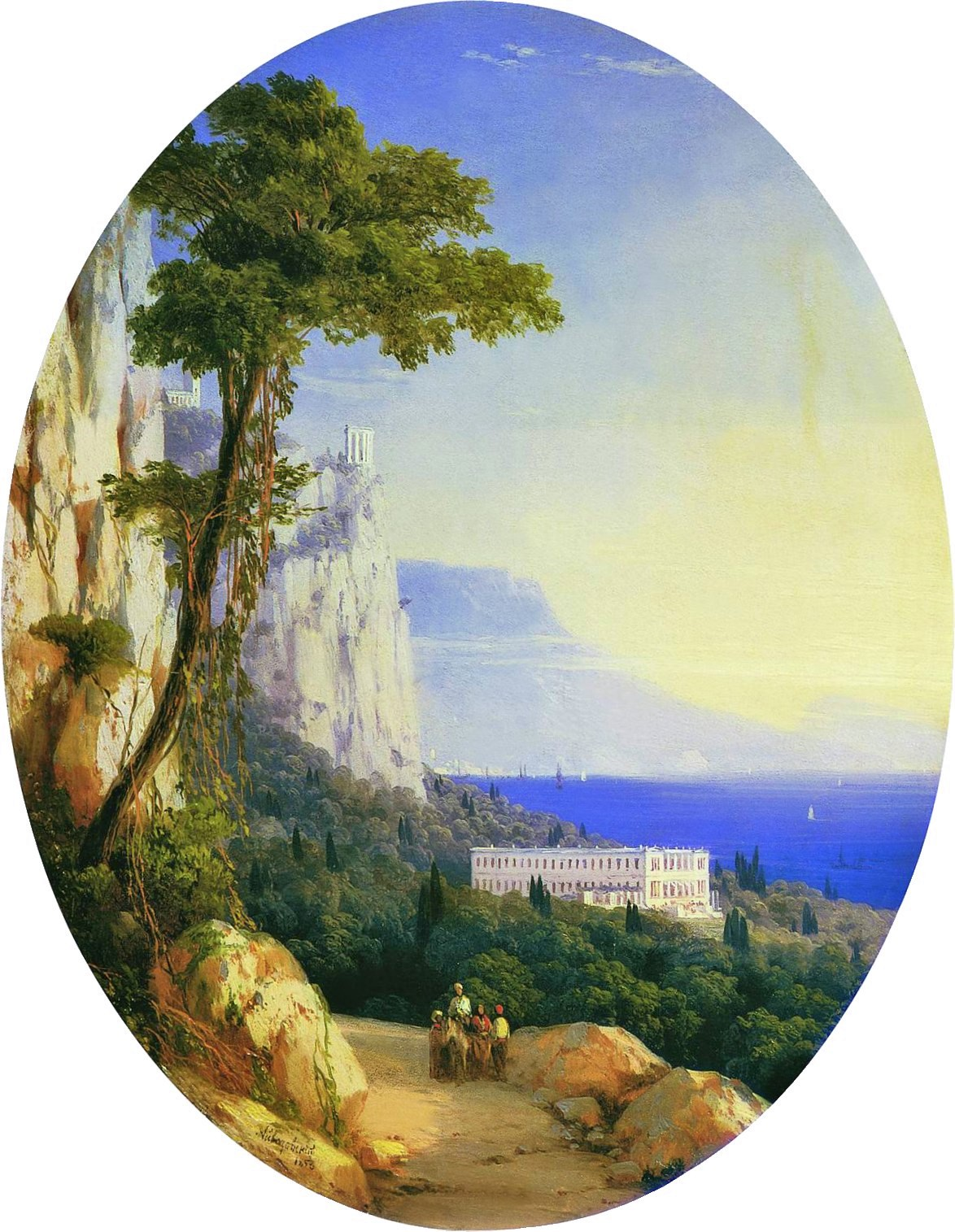 Вид в Ореанде. 1858 Дерево, масло. 34х27см. Государственный художественно-архитектурный дворцово-парковый музей-заповедник "Петергоф"